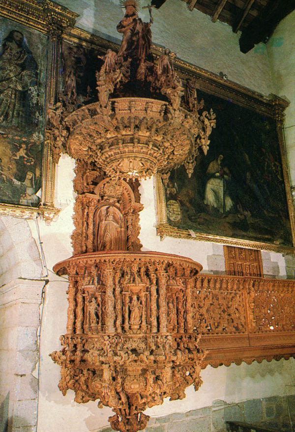 Púlpito de iglesia de San Blas, atribuido a Juan Tomás Tuyro Tupac.